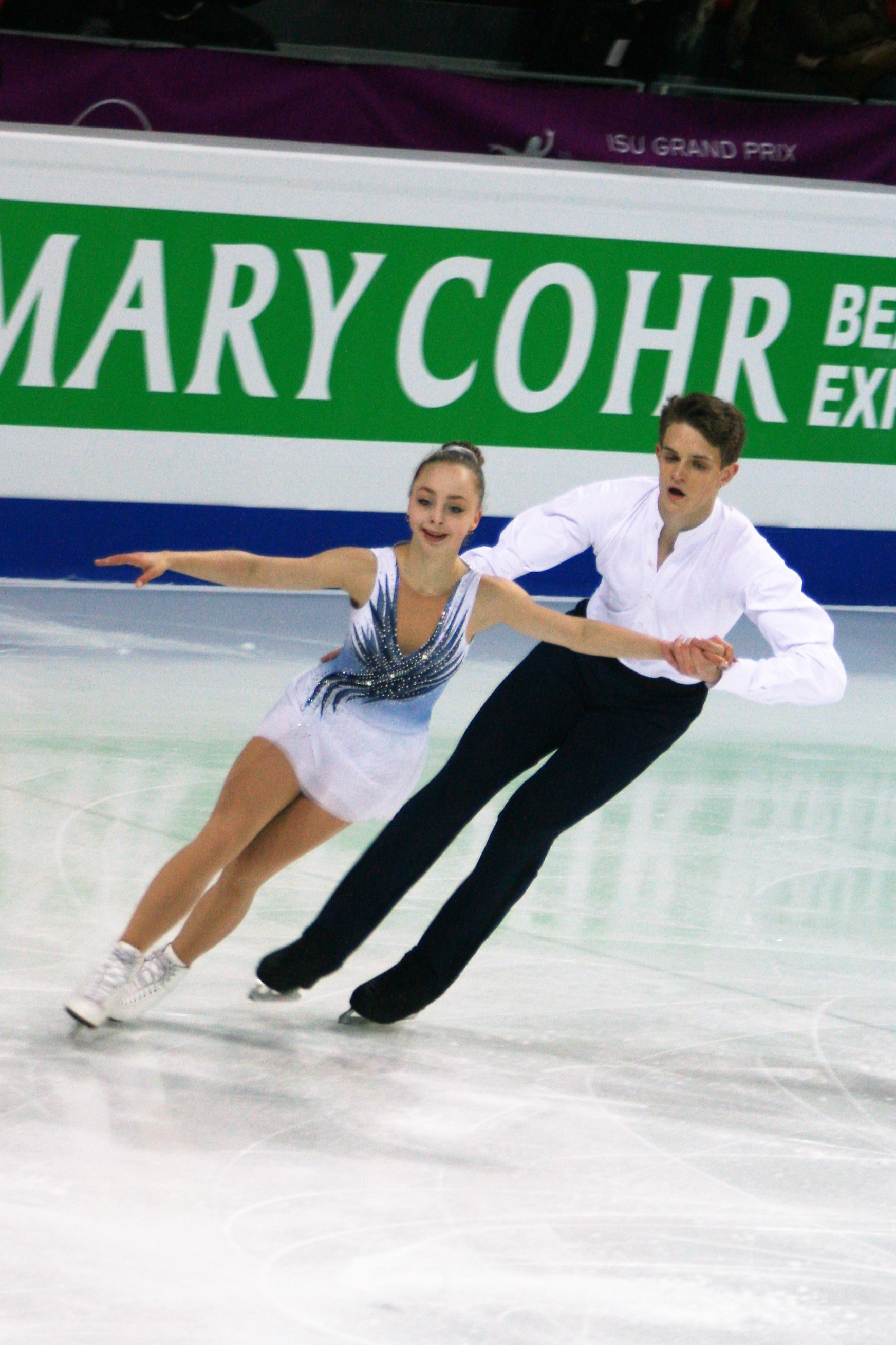 Александра Бойкова / Дмитрий Козловский (Россия) на финале Гран-при по фигурному катанию среди юниоров 2016-2017